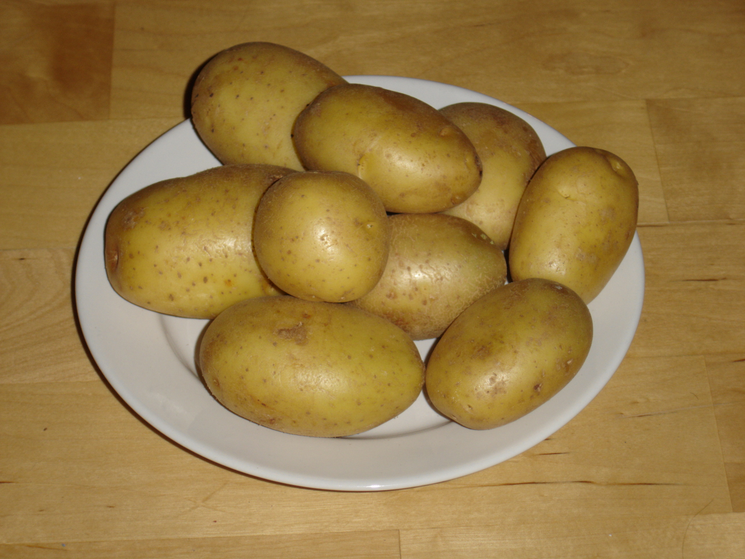 Kartoffeln der Sorte 'Marabel'. Eigenes Foto. Gnu FDL.